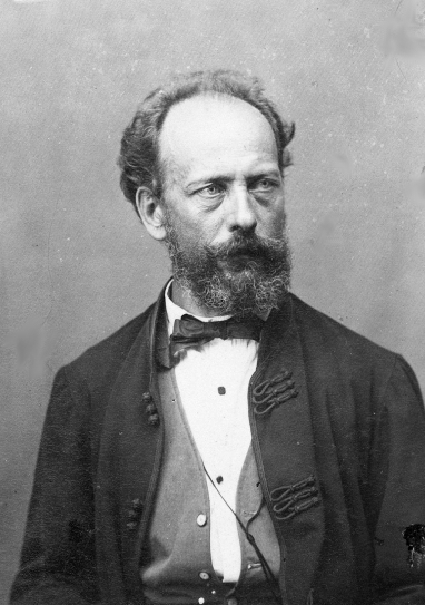 Sztereofotó. Görgői és toporci Görgey Artúr (Toporc, 1818. január 30. – Budapest, Lipótváros, 1916. május 21.) 1848–49-es honvédtábornok, hadügyminiszter, az 1848–49-es forradalom és szabadságharc idején több alkalommal a honvédsereg fővezére.